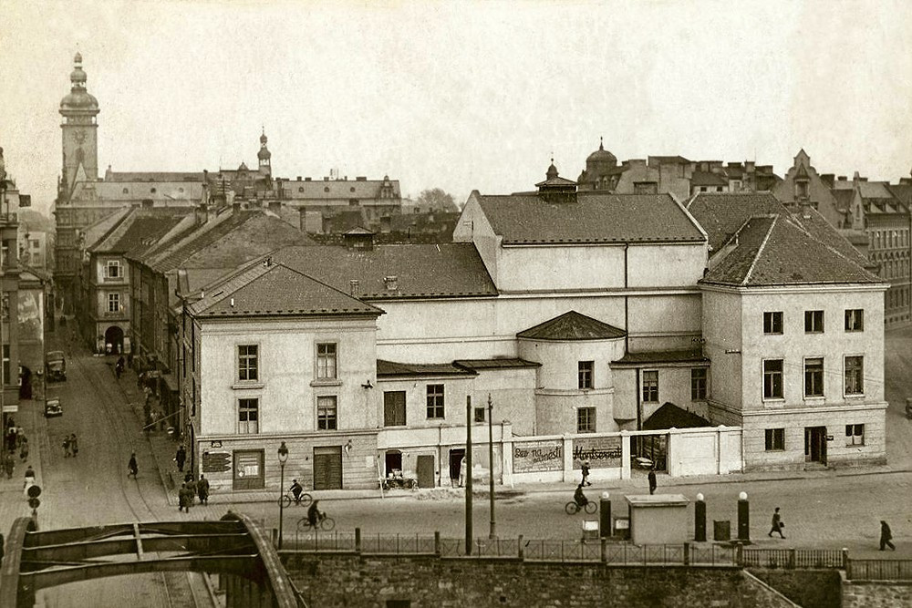 Budova jihočeského divadla s Bílou věž, po rekonstrukci následující americkému bombardování 1945